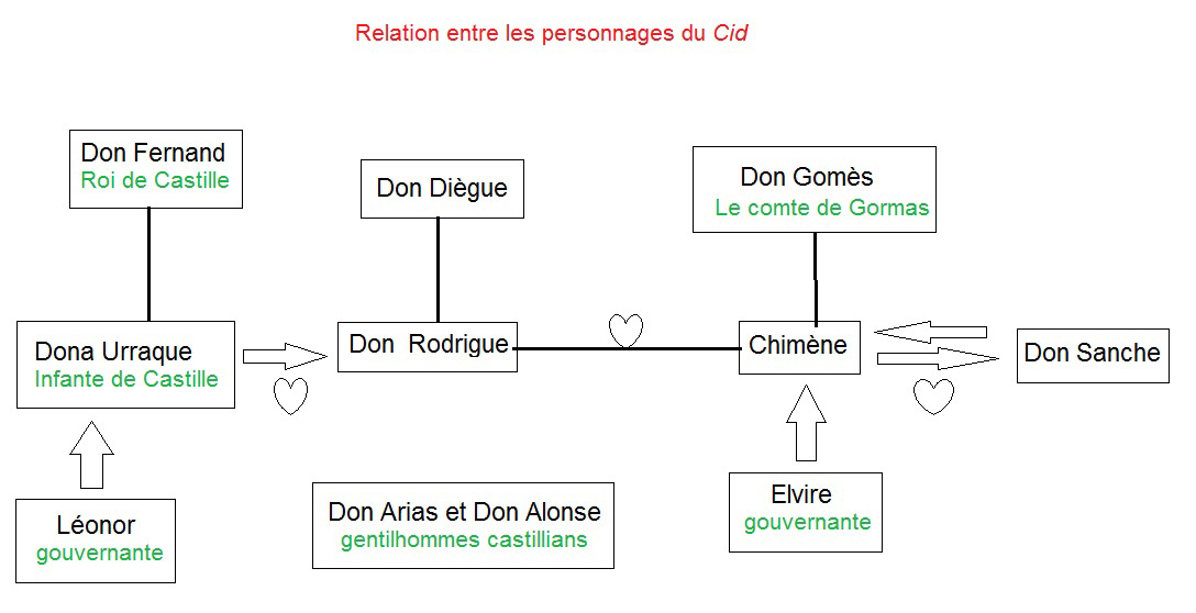 Arbre représentant les différentes relations entre les personnages du Cid